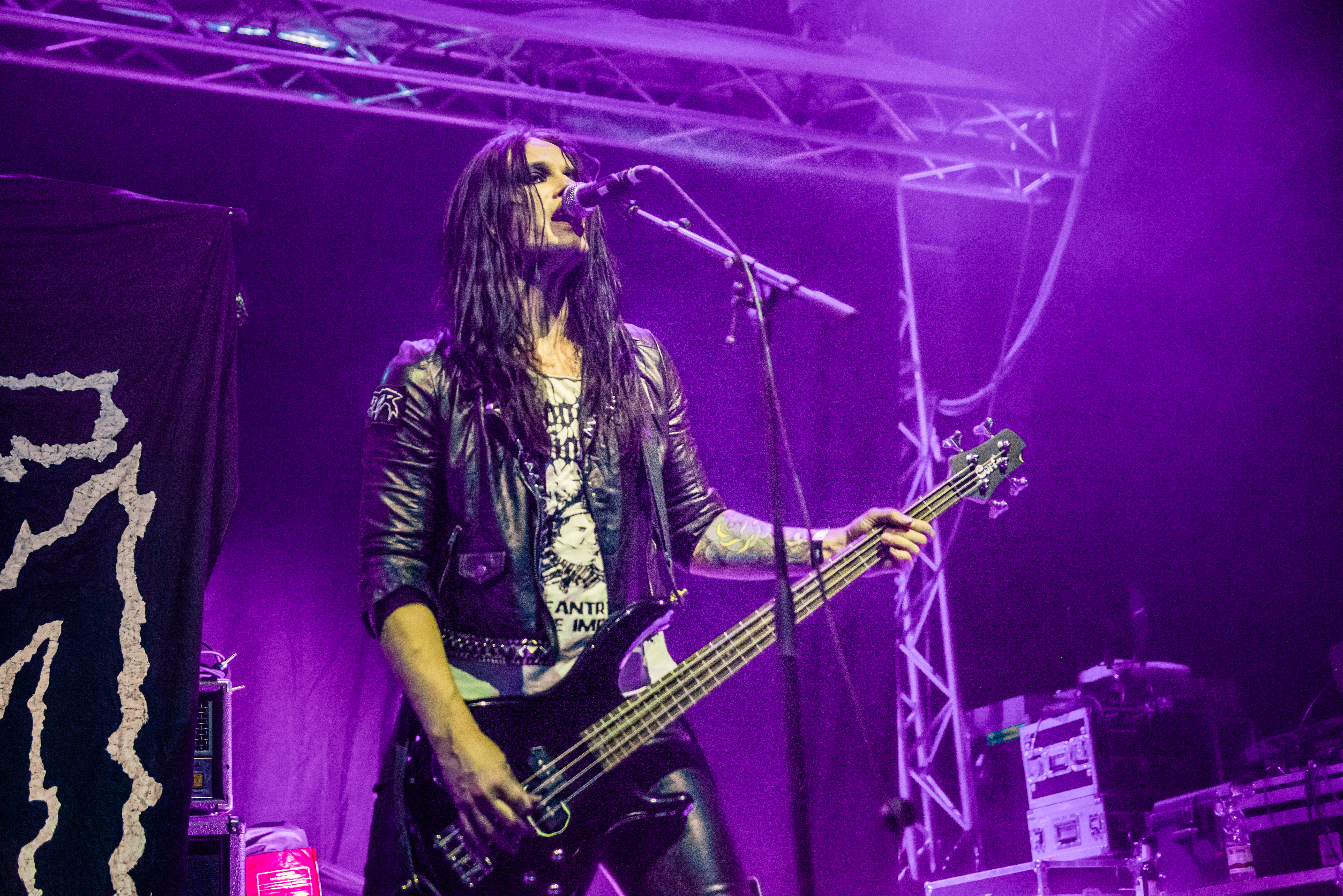 'Ruhrpott Metal Meeting 2016; Oberhausen Turbinenhalle': 'Sister'